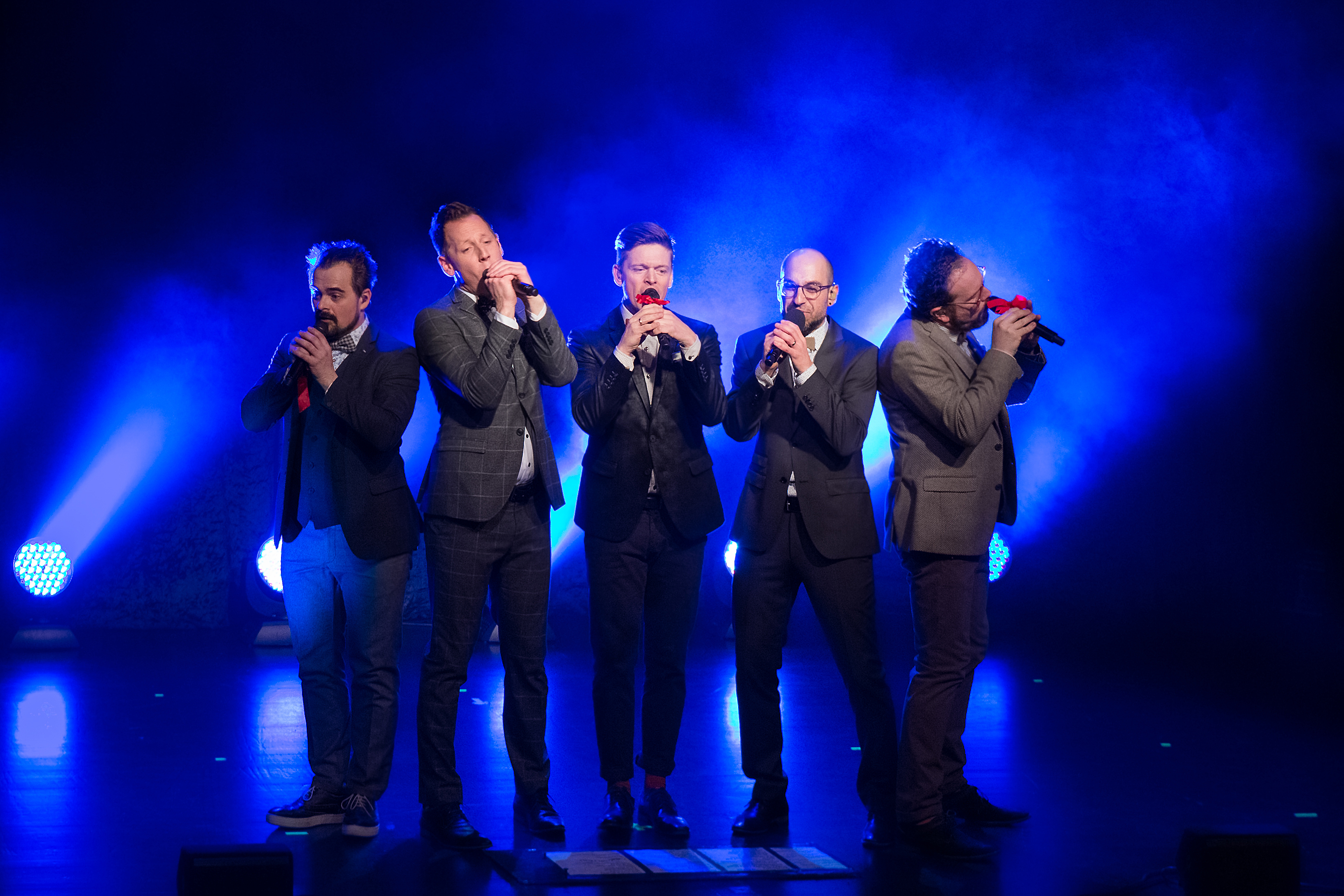 VIVA VOCE feiern 2018 ihr 20-jähriges Jubiläum und sind mit der Jubiläumsshow 20 Jahre "Es lebe die Stimme!" seit Anfang 2018 auf Tour